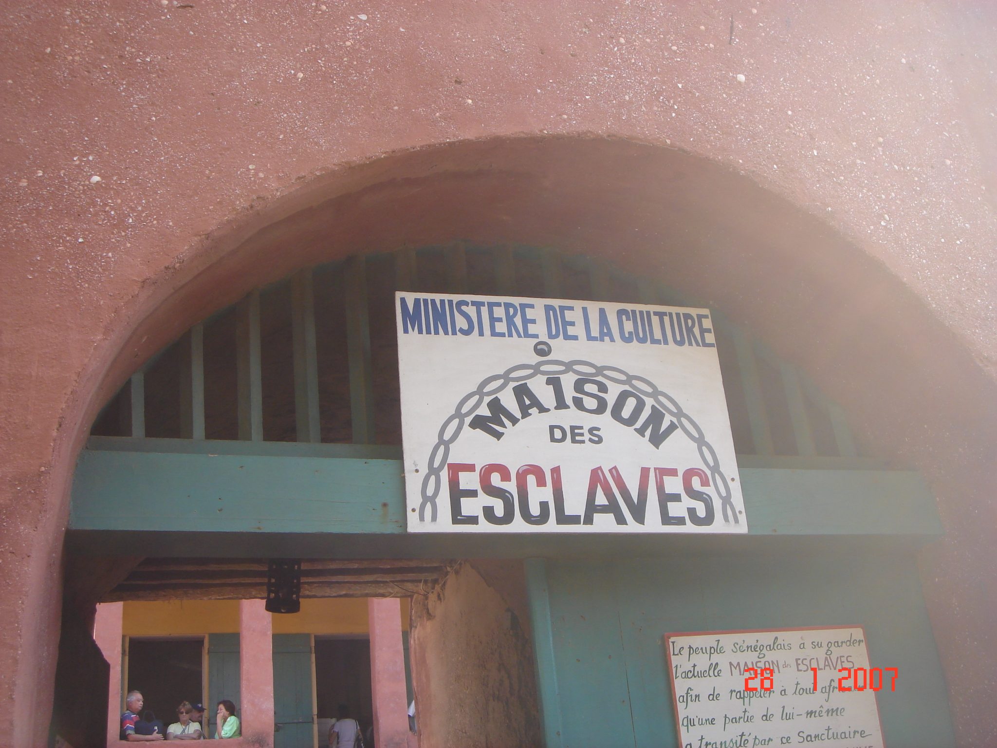 Ile de Gorée (Sénégal) : entrée de la Maison des Esclaves